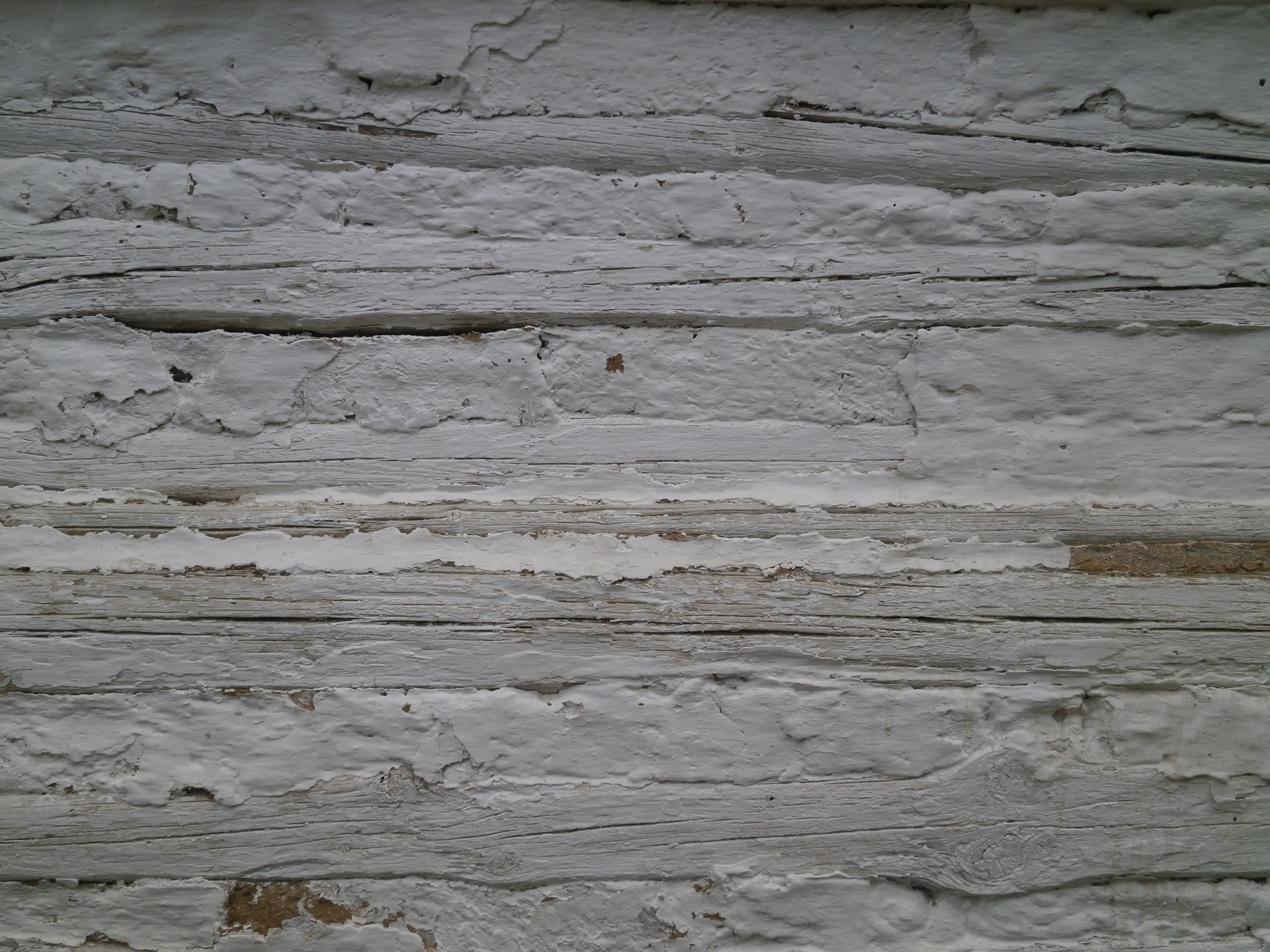 Svobodín - roubenka u č.p. 15, detail roubení utěsněného mazanicí